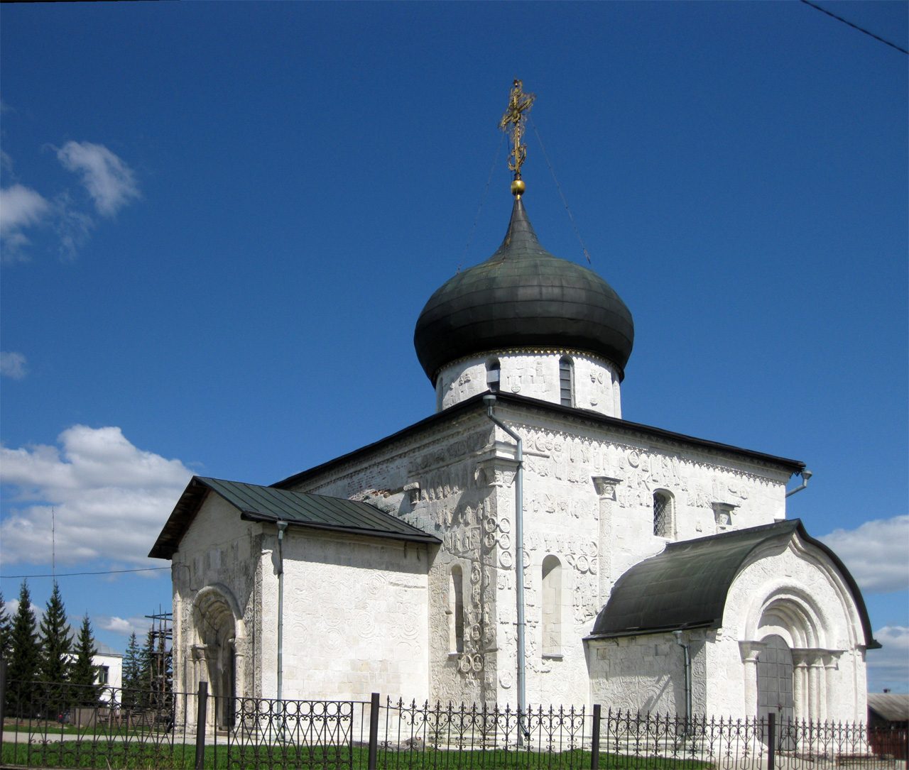 Собор Георгиевский (Георгиевский собор и земляные валы городища) (Владимирская область, Юрьев-Польский, улица 1 Мая)